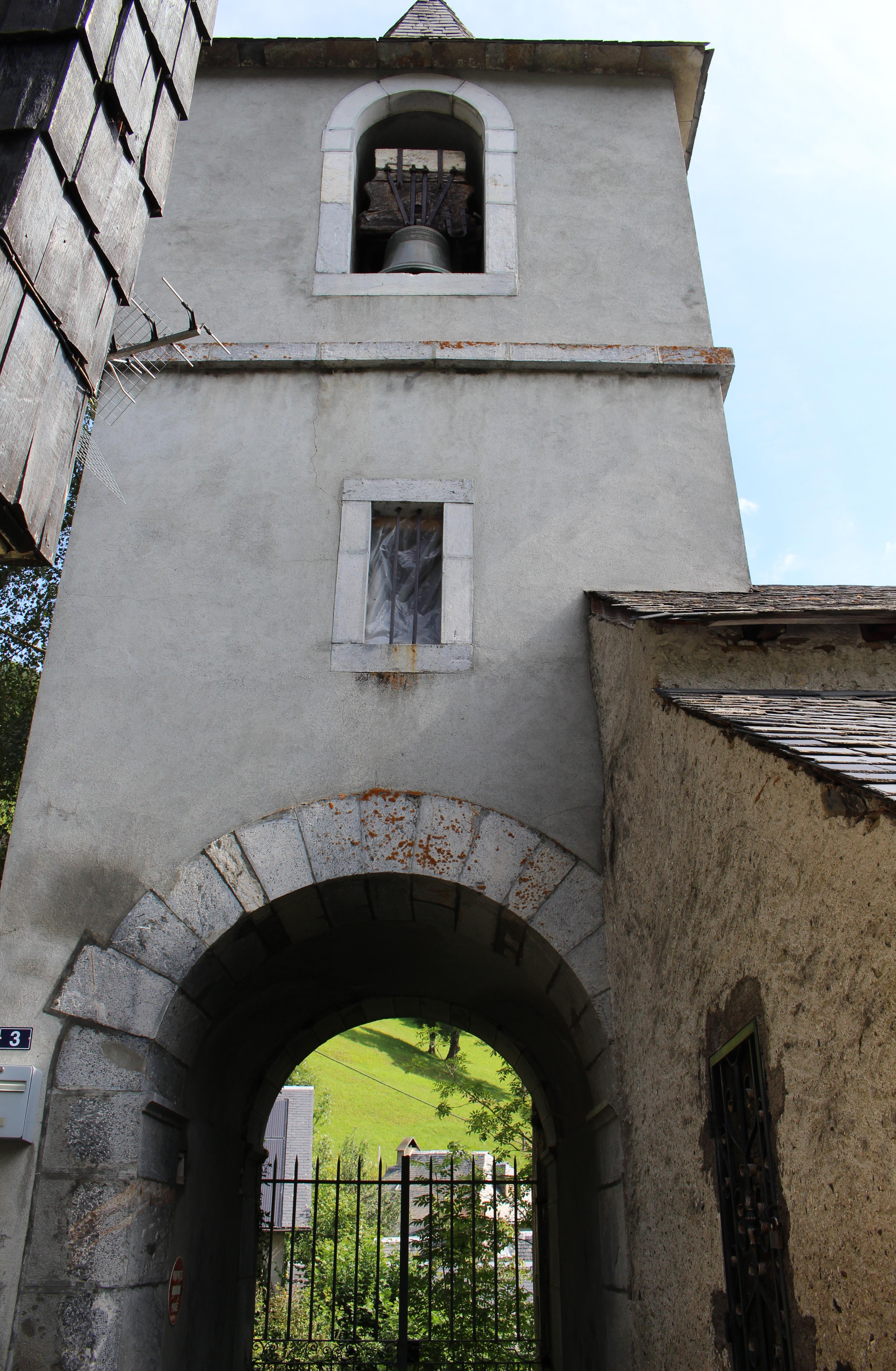 Église Saint-Martin de Barrancoueu (Hautes-Pyrénées)